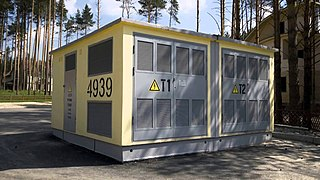 Комплектная трансформаторная подстанция(КТП) 10/6-0,4 кВ закрытого типа.